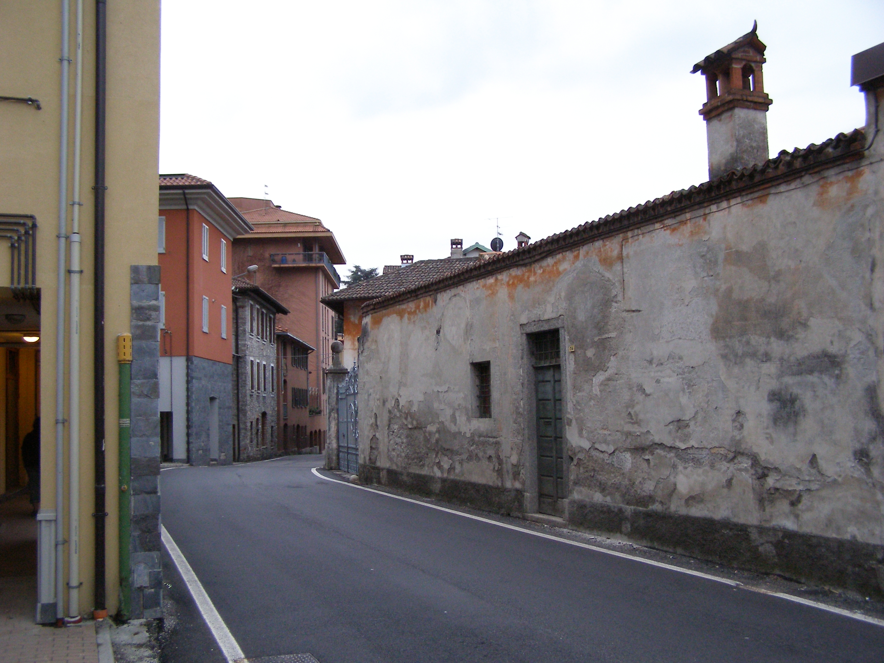 Varenna - Fiumelatte - Strada Provincionale No. 72